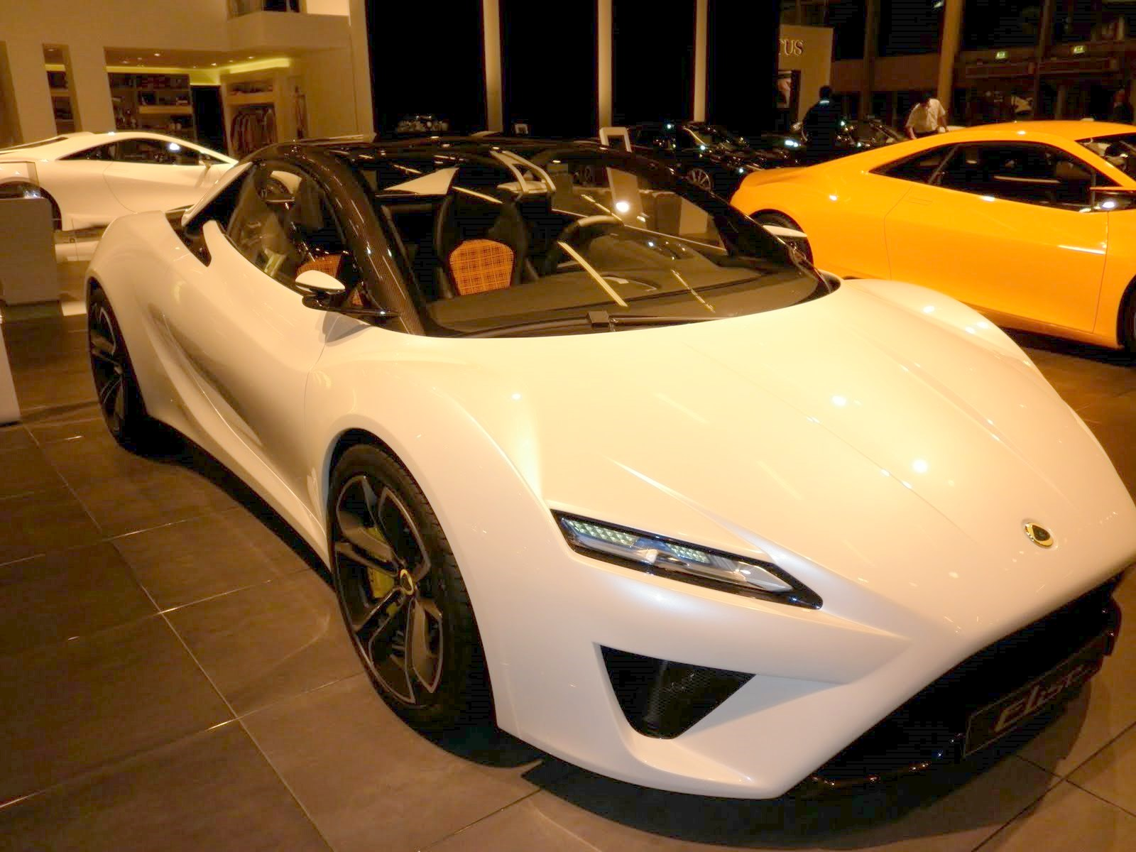 Stand Lotus Mondial de Paris